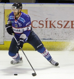 Orbán Attila, Székesfehérvár.